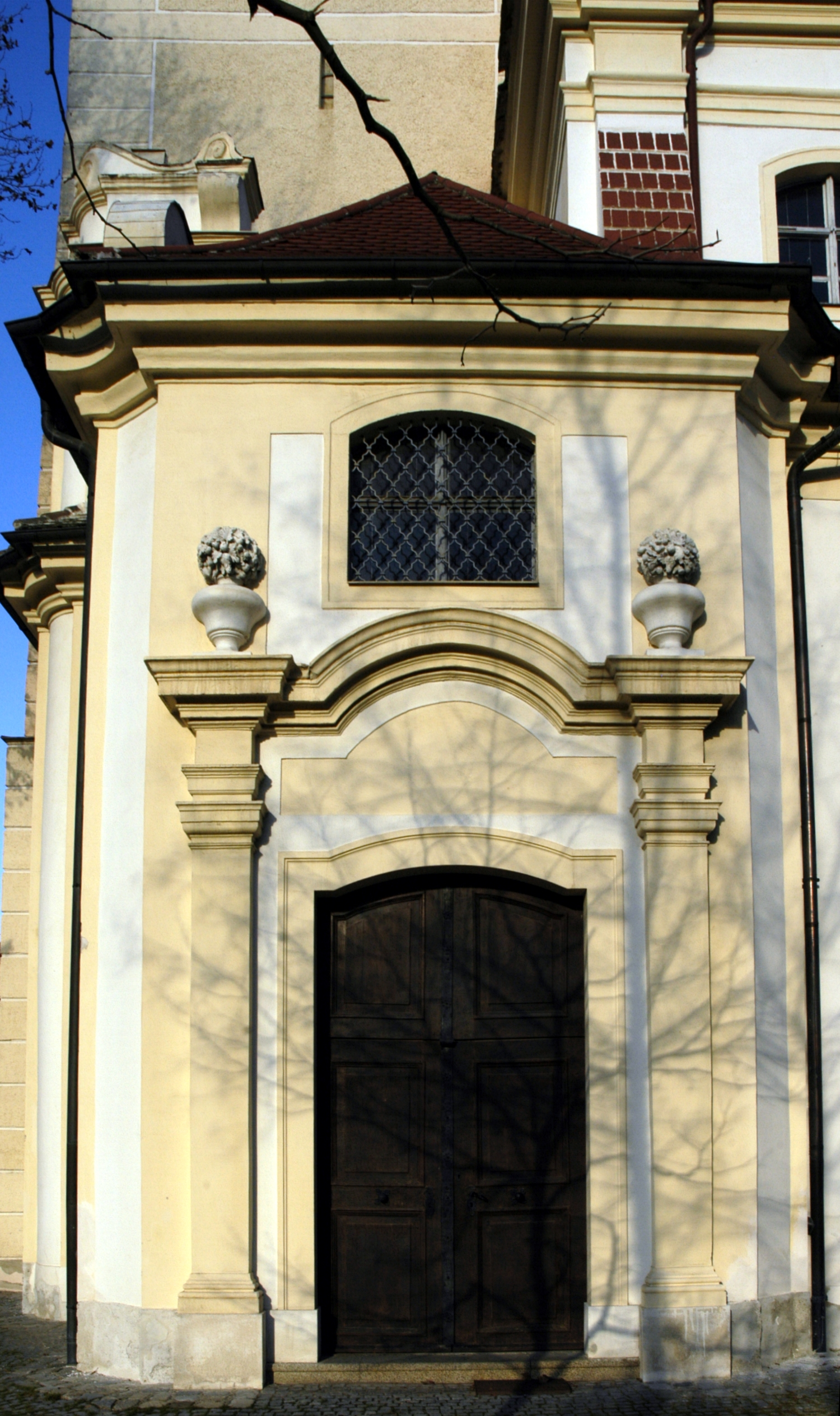 Portal zur nördlichen Vorhalle an der Turmbasis